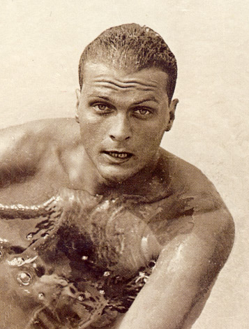 Paolo Pucci